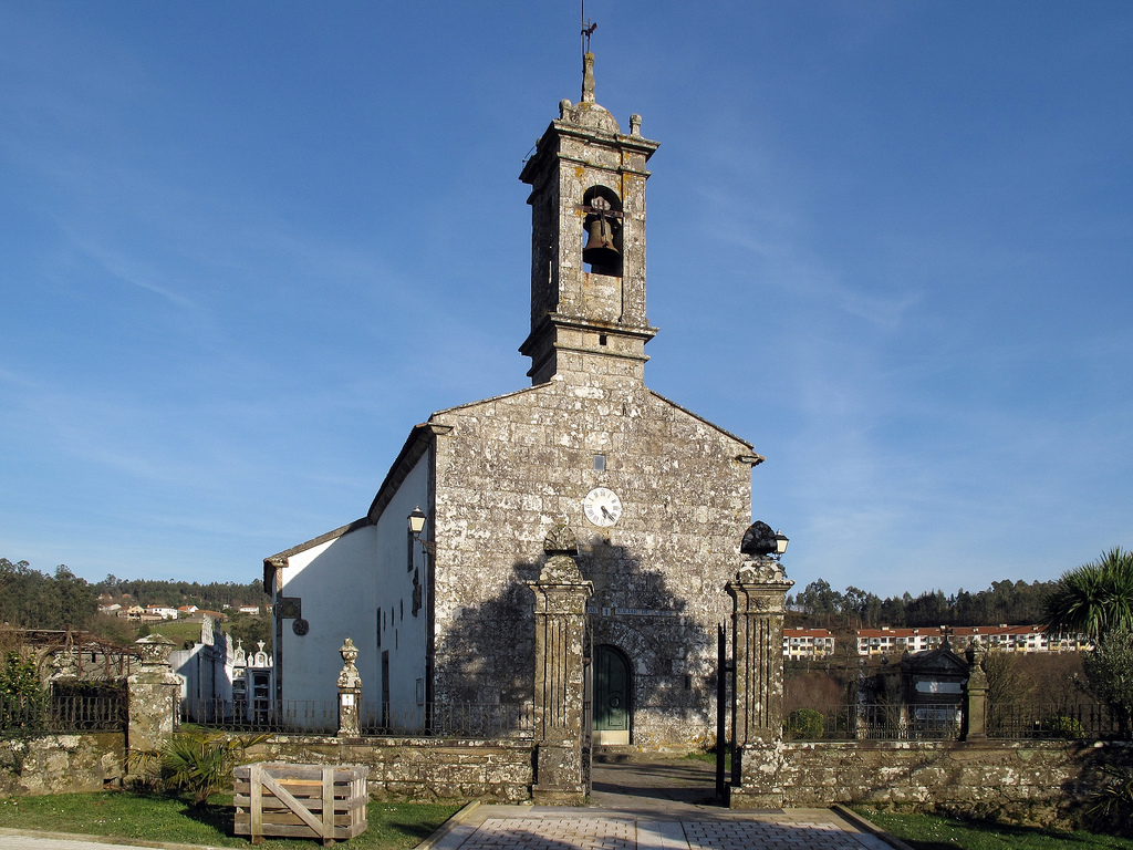 Igrexa de San Xián de Sales no lugar de Cibrán, parroquia de Sales, concello de Vedra, Galiza